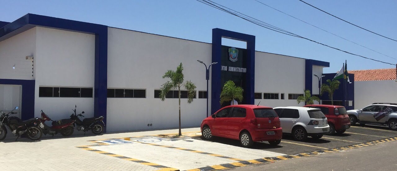 Sede administrativa da Prefeitura Municipal de Tibau, construída recursos próprios na gestão do prefeito Josinaldo Marcos de Souza, inaugurada no dia 04/08/2017, localizada na Rua do Pargo, 76 - Centro - Tibau/RN